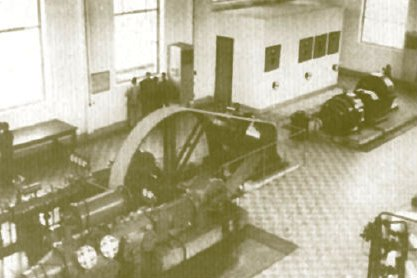 Az Egyesült Izzólámpa és Villamossági Rt. kriptongyárának gépterme. Ez volt a világ első kriptongyára.